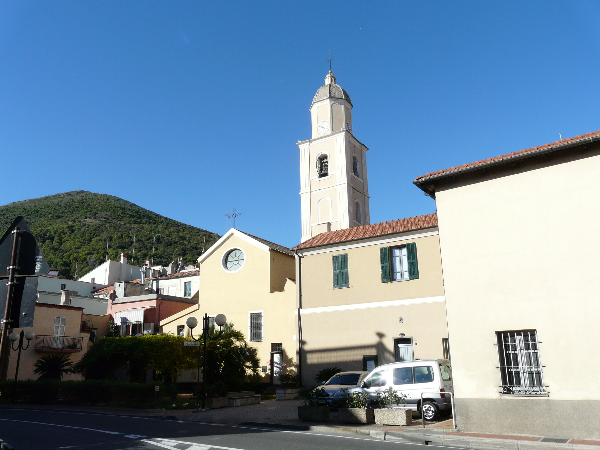 Chiesa di San Matteo, Borghetto Santo Spirito, Liguria, Italia